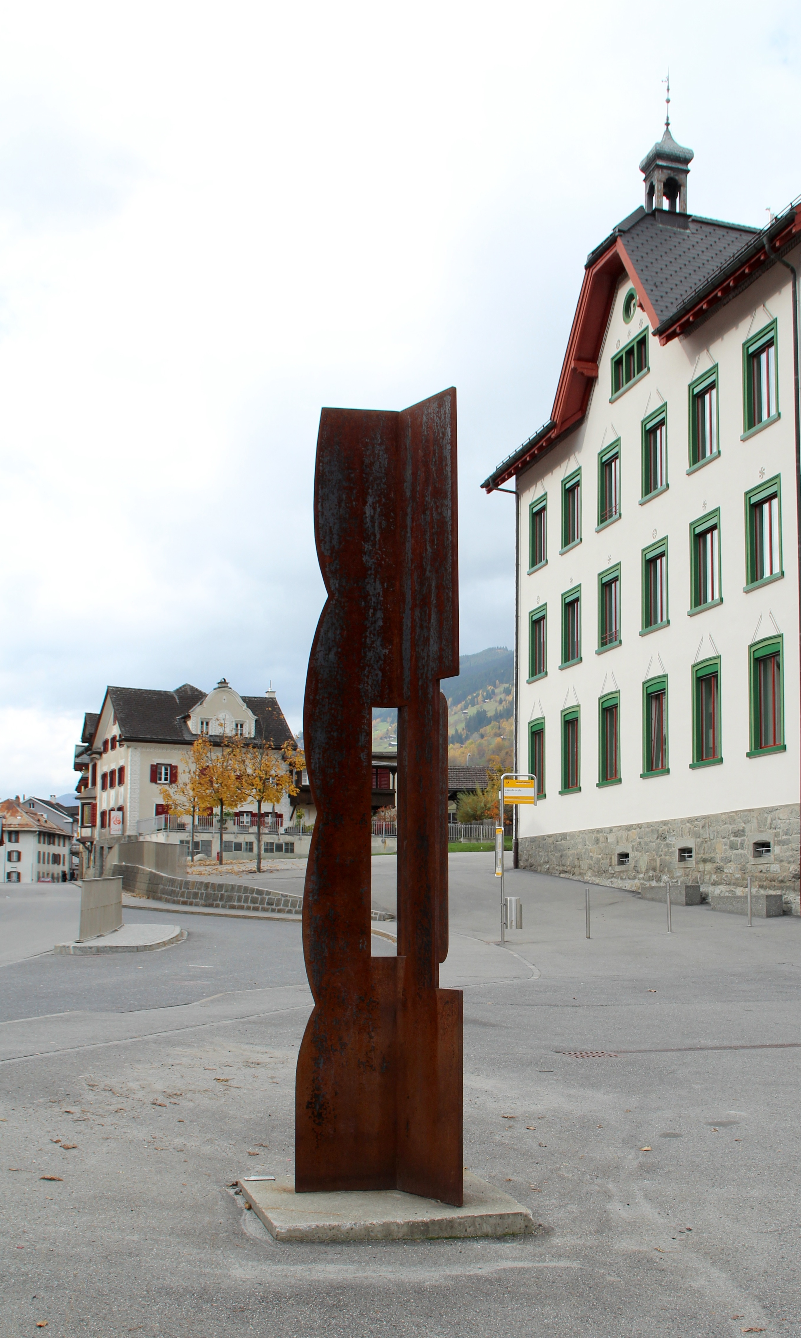 Skulptur von Matias Spescha in Trun GR